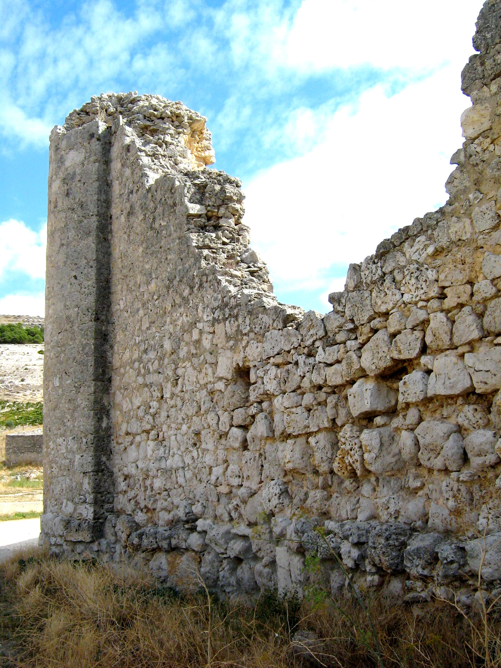 Curiel de Duero. Muralla del Castillo. Mancomunidad de Villa y Tierra de Curiel. Valle del Cuco. Valladolid